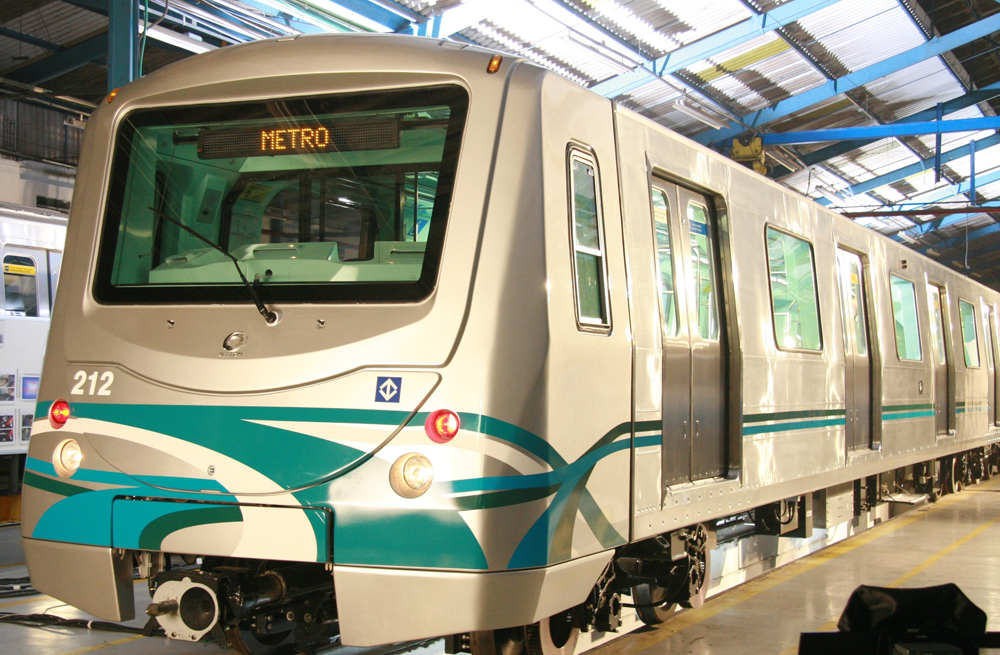 Crédito: Arquivo/ANPTrilhos